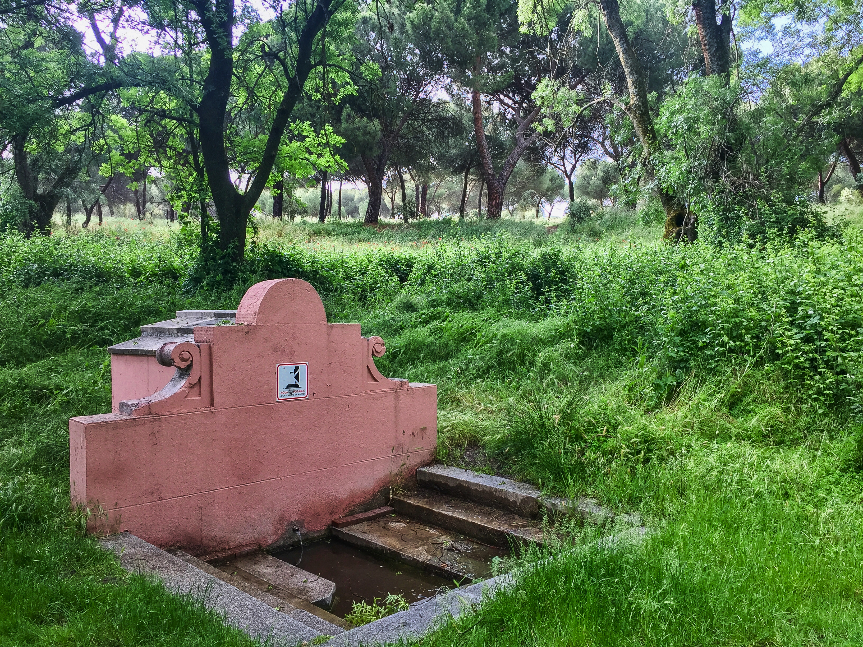 Fuente del Zarzón, Casa de Campo, Madrid, España